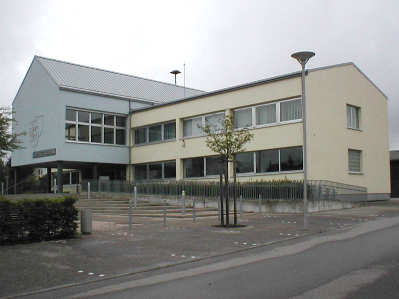 Rathaus in Siegelsbach